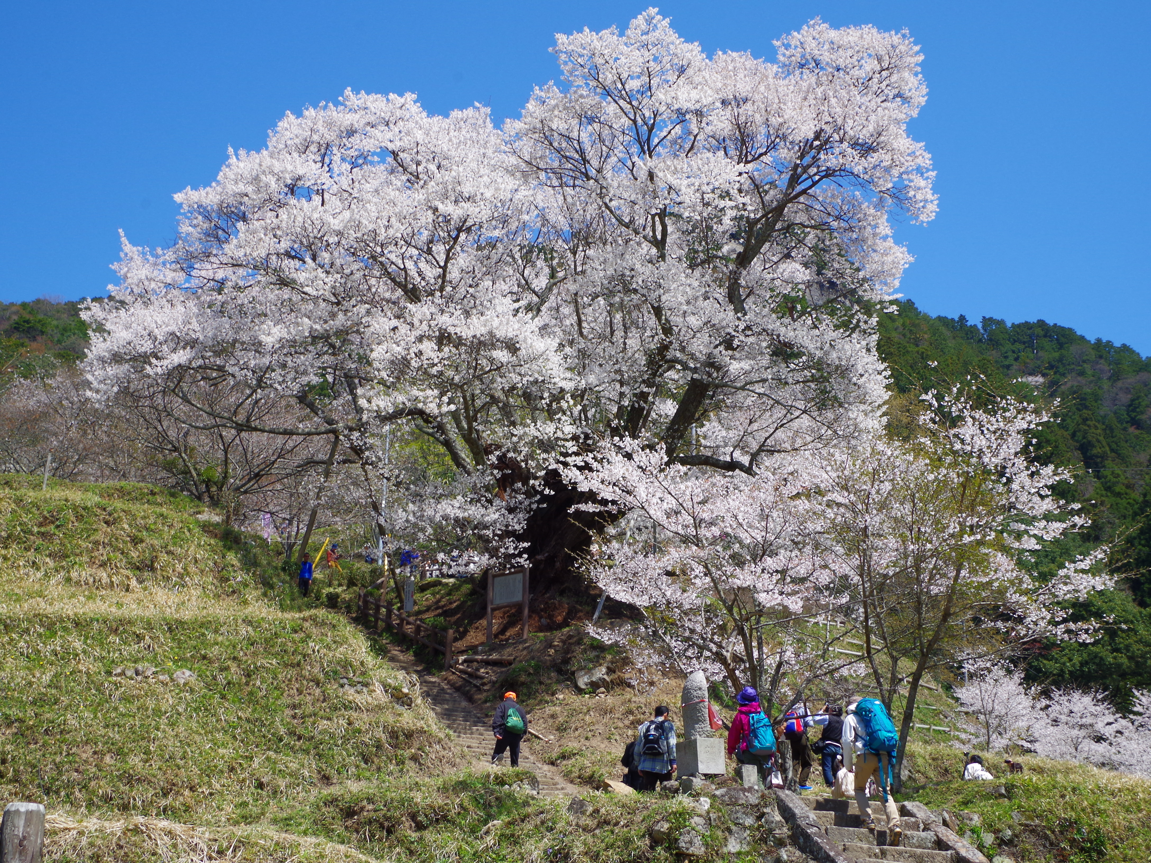 仏隆寺の「千年桜」 宇陀市榛原赤埴 Sen-nen-zakura 2013.4.13